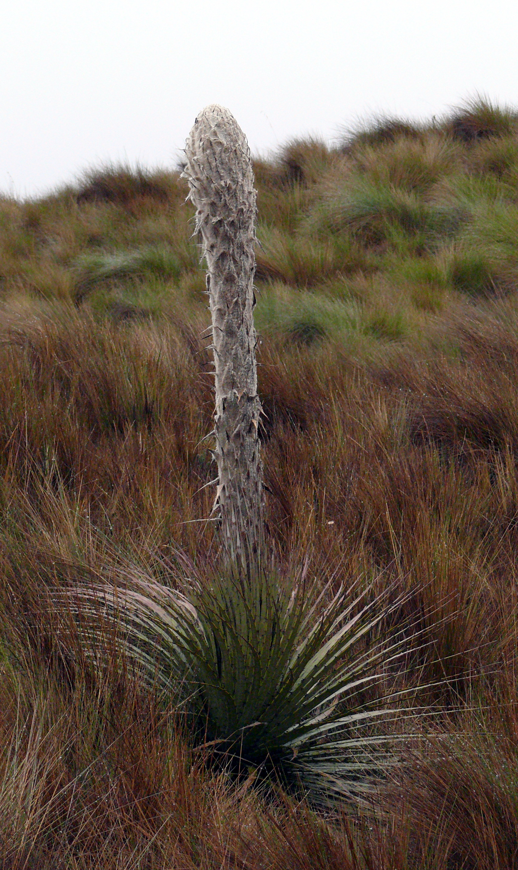 Achupilla, Aguarongo (Puya clava-herculis)